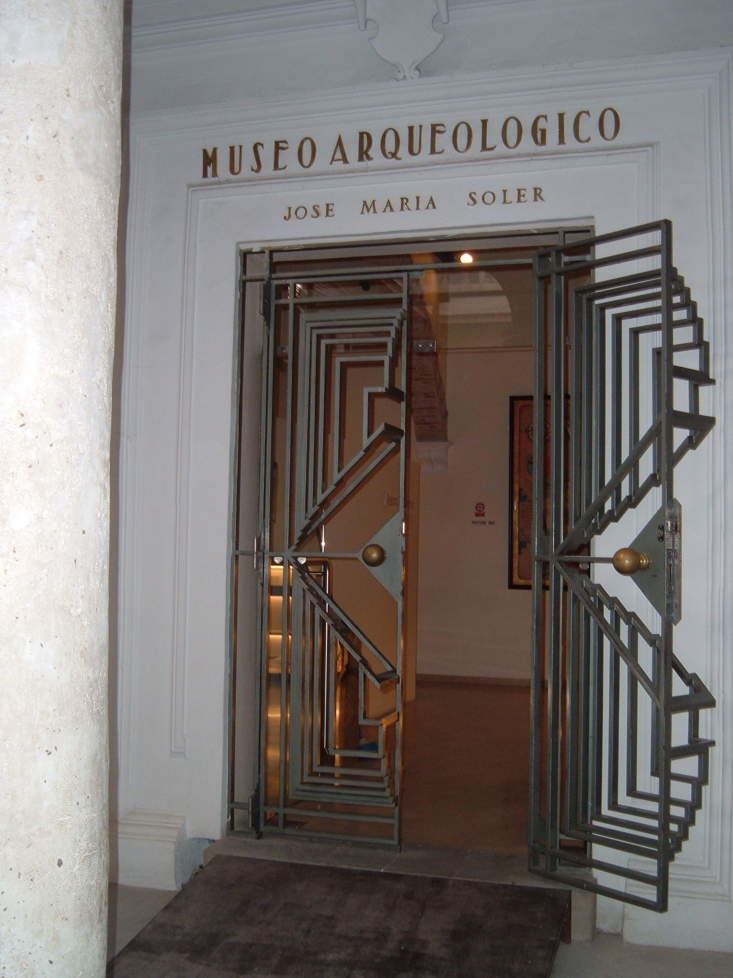 Porta del Museu Arqueològic José María Soler.